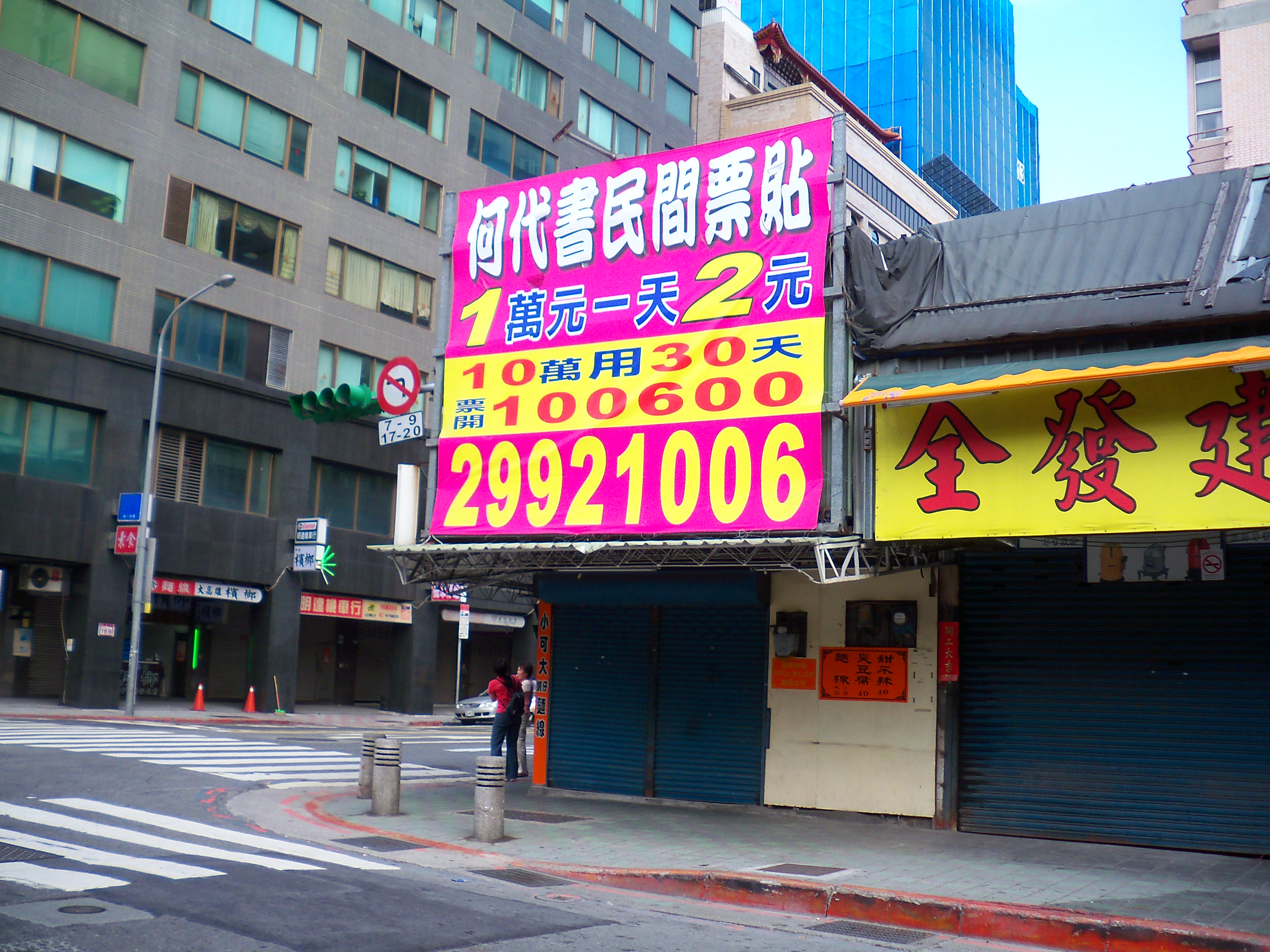 臺北市中山區建國北路二段與長春路口附近，建國北路二段建築外的巨幅民間票貼廣告。